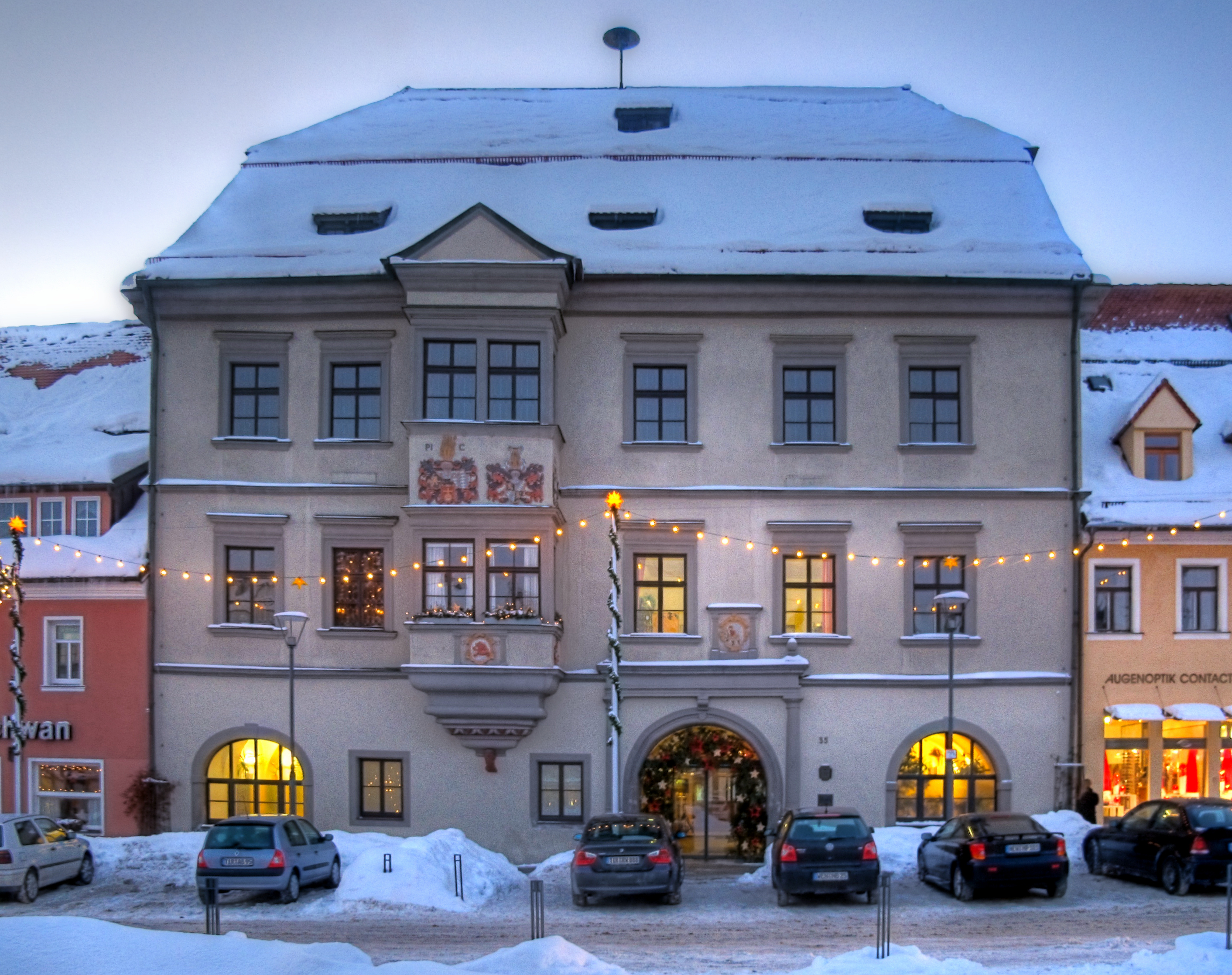 Deutschland, Bayern, Landkreis Tirschenreuth, Stadt Tirschenreuth, Rathaus, Dezember 2010